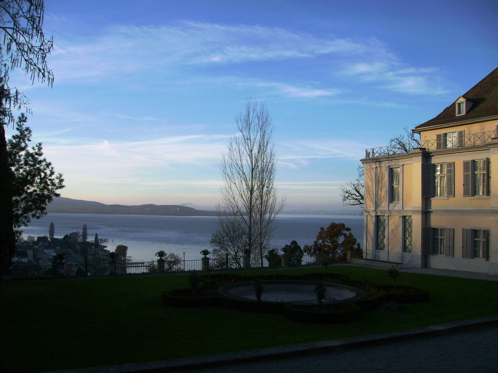 Arenenberg, Blick vom Garten zum Bodensee